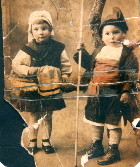 Traxe rexonal Asturies